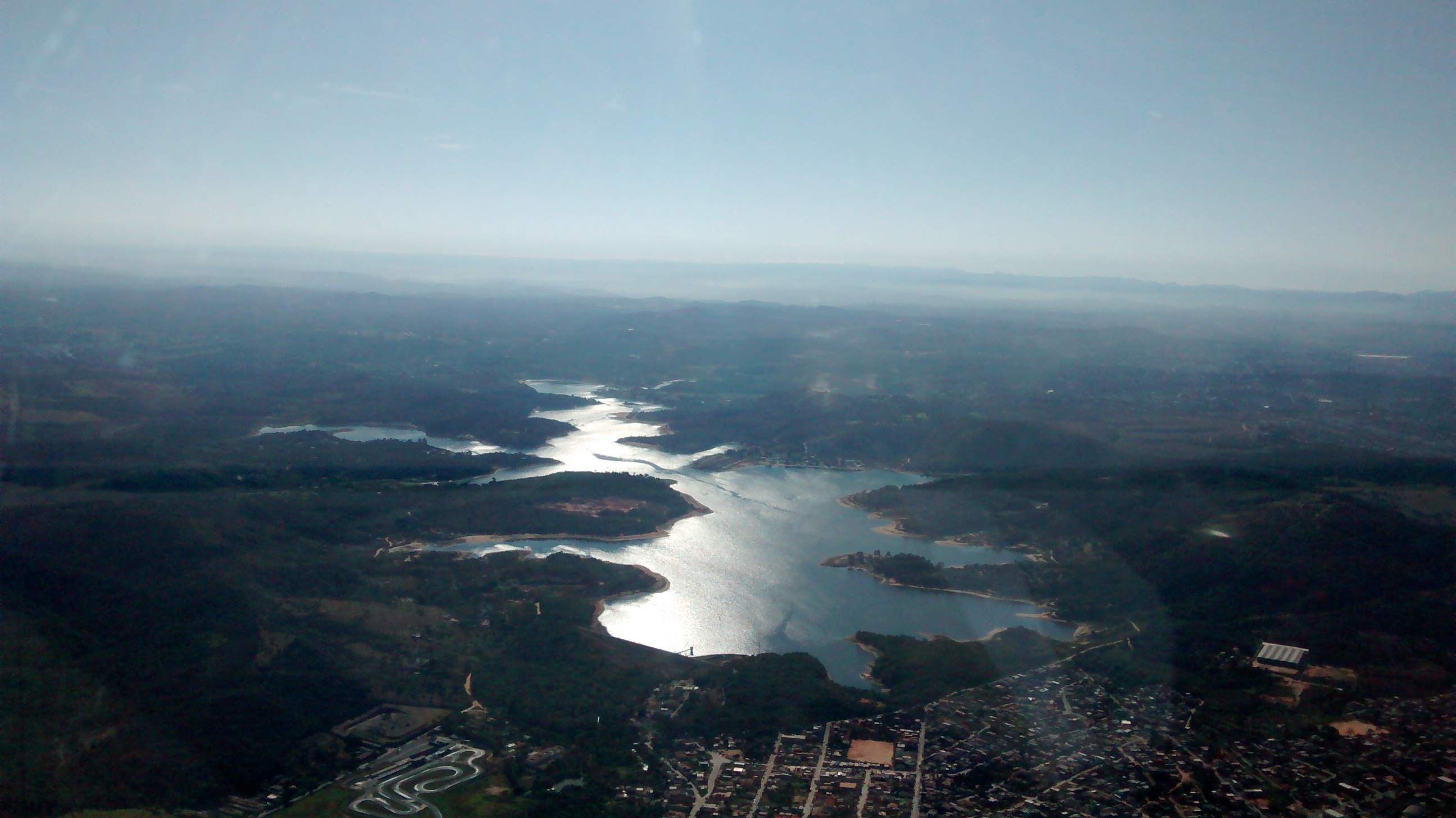 Lagoa Varzea da Palma